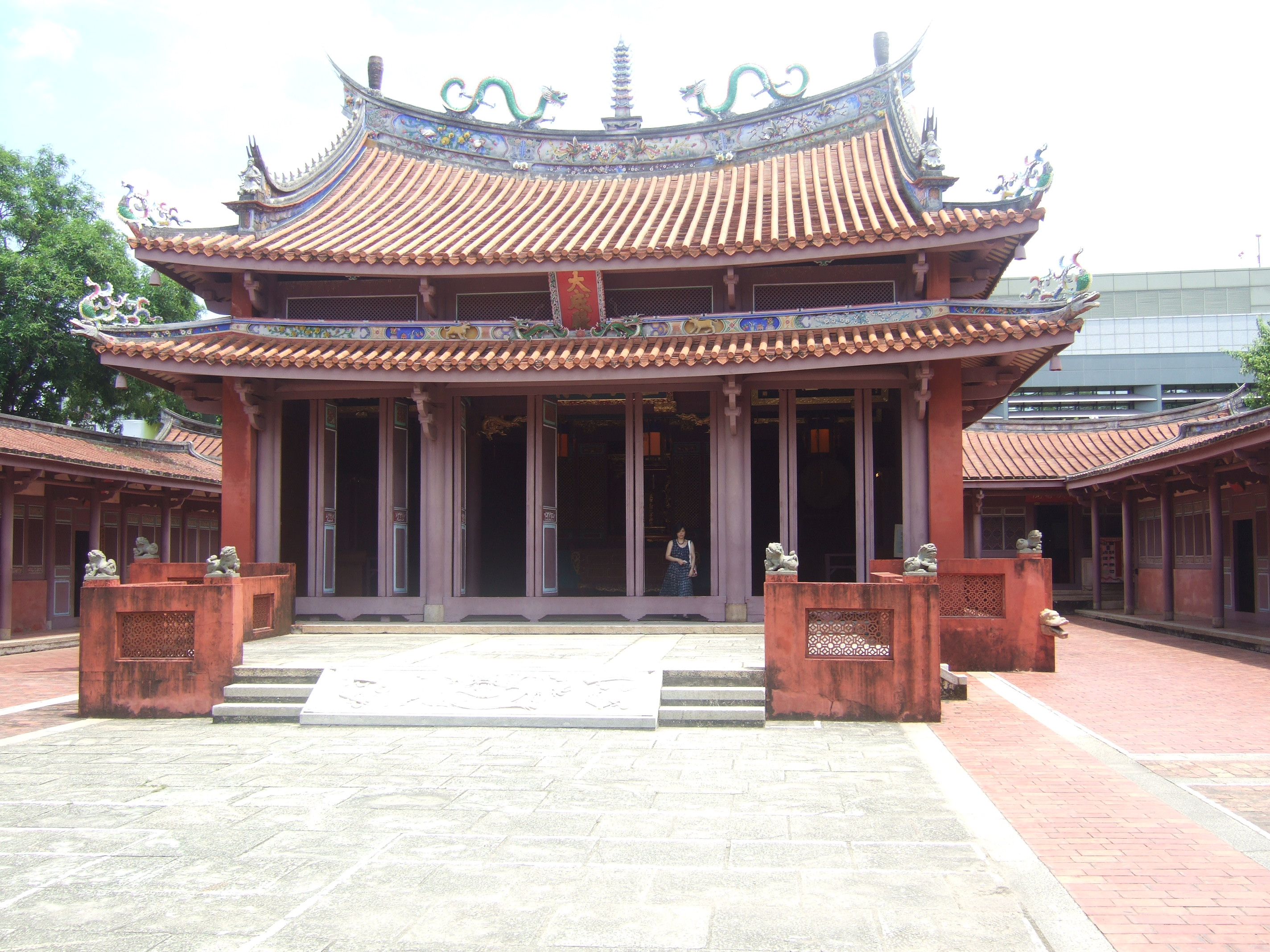 台南孔廟大成殿